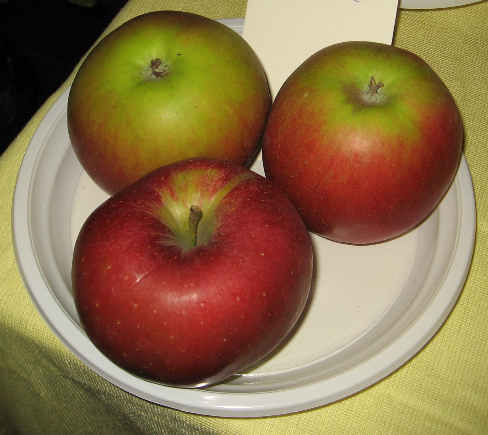 odrůda Melrose